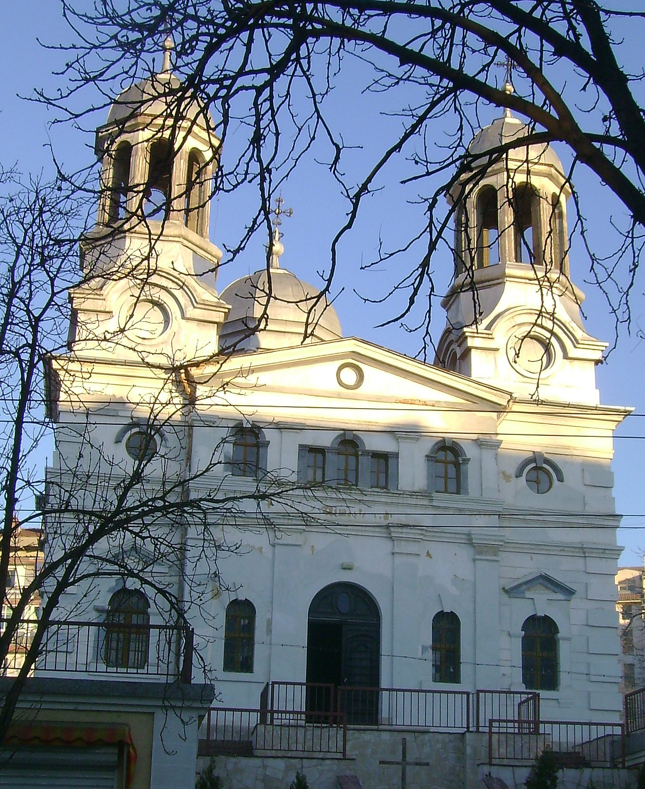 Православна църква / Eastern Orthodox Church